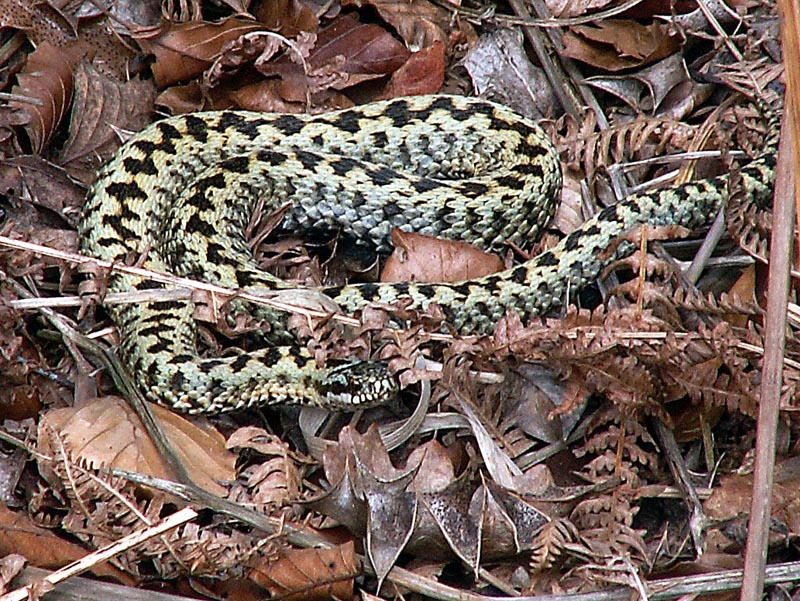 Male Adder Vipera berus. Epping Forest.